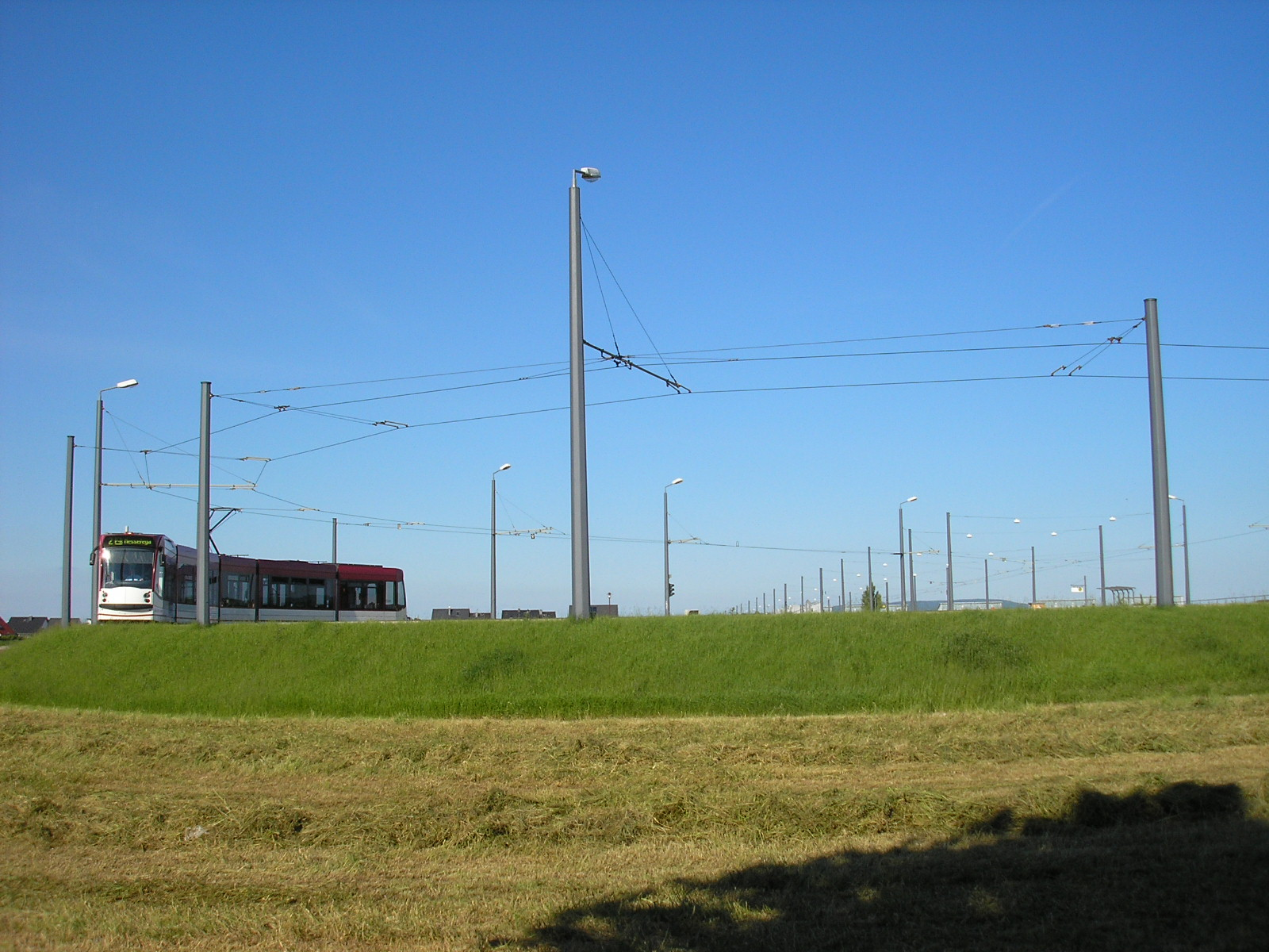 Die Straßenbahnwendeschleife auf dem Ringelberg in Erfurt.